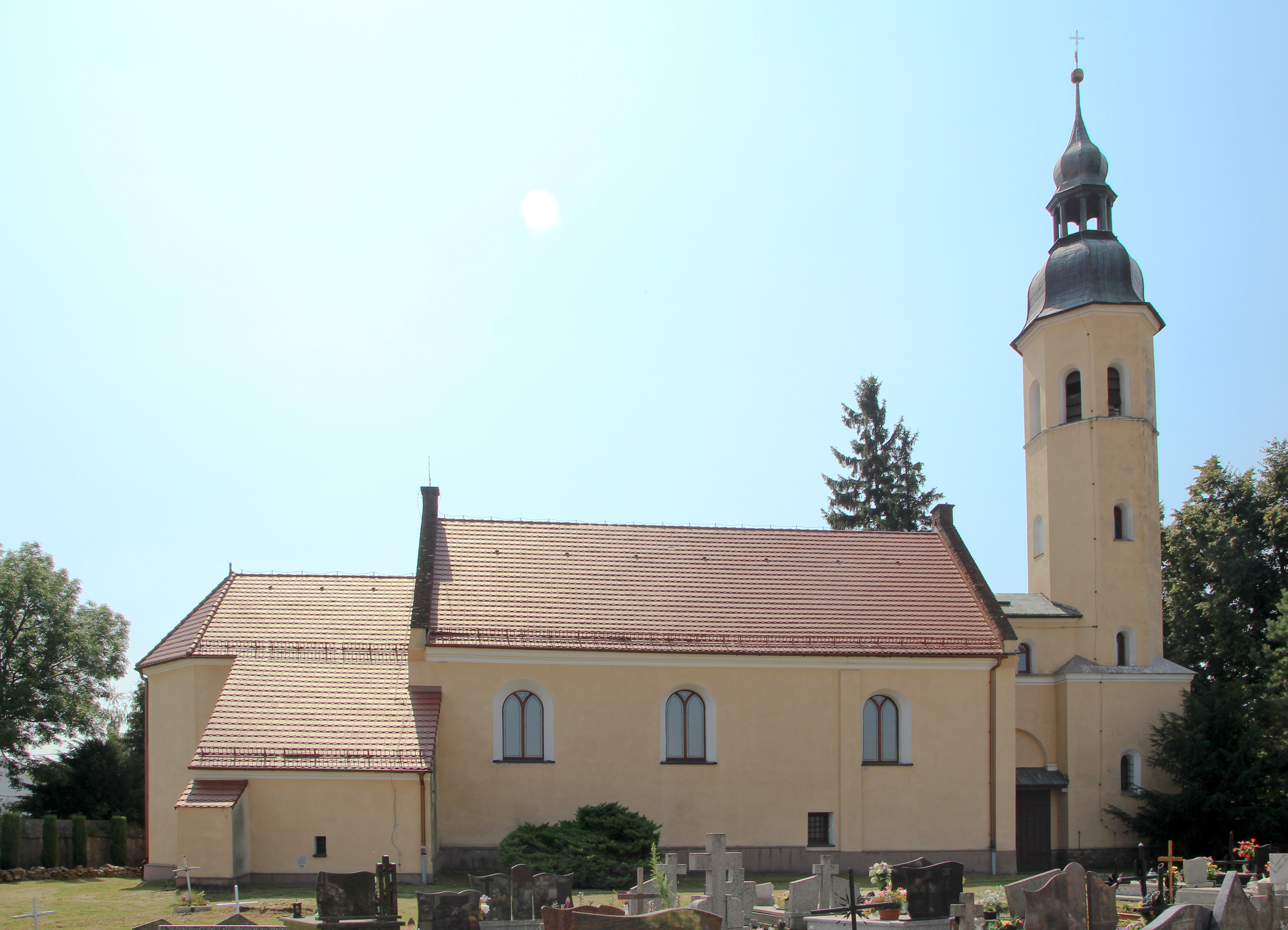 Gościce – wieś w Polsce, w województwie opolskim, w powiecie nyskim, w gminie Paczków.